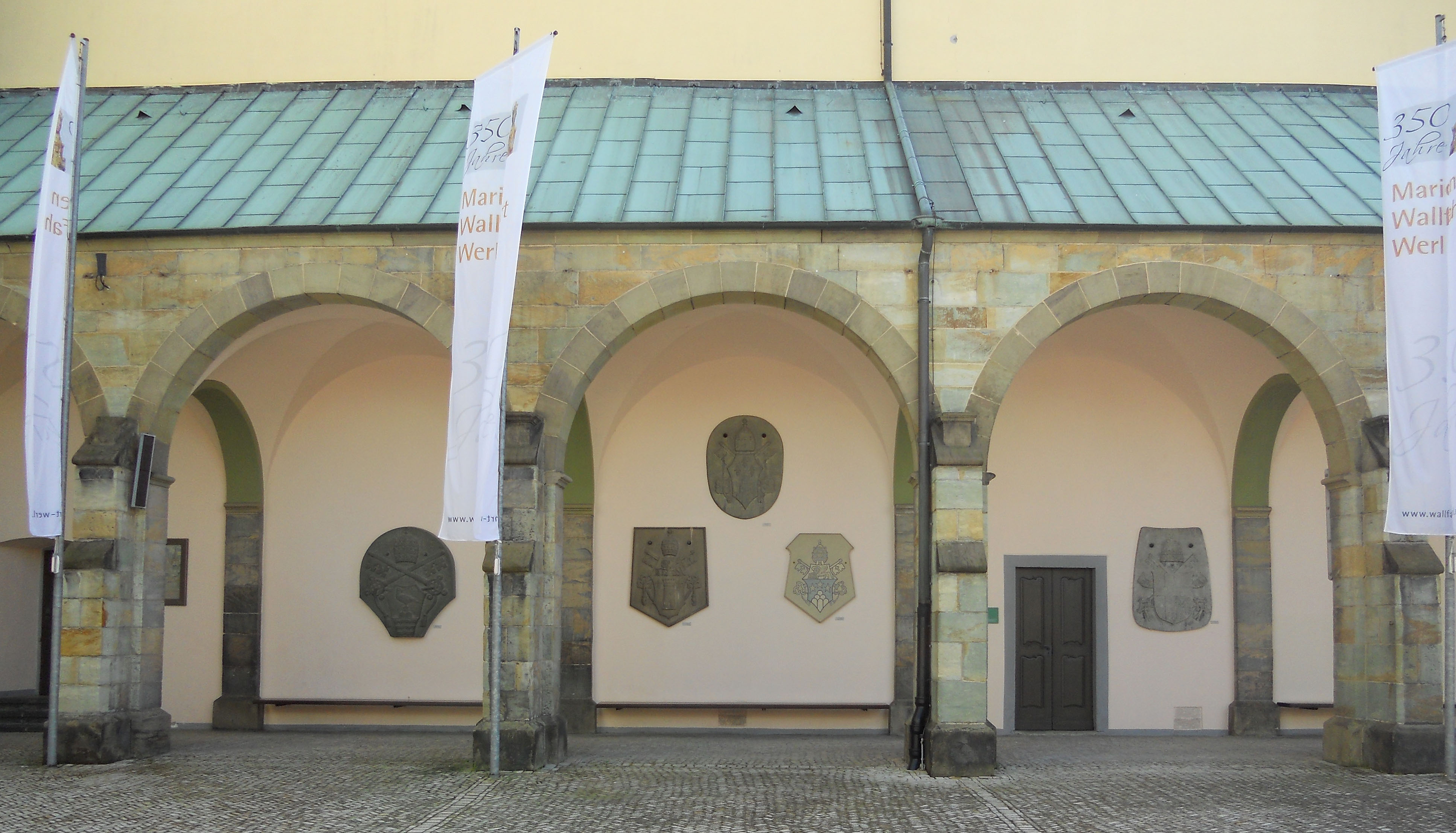 Seitenansicht der alten Wallfahrtskirchen mit den Papstwappen